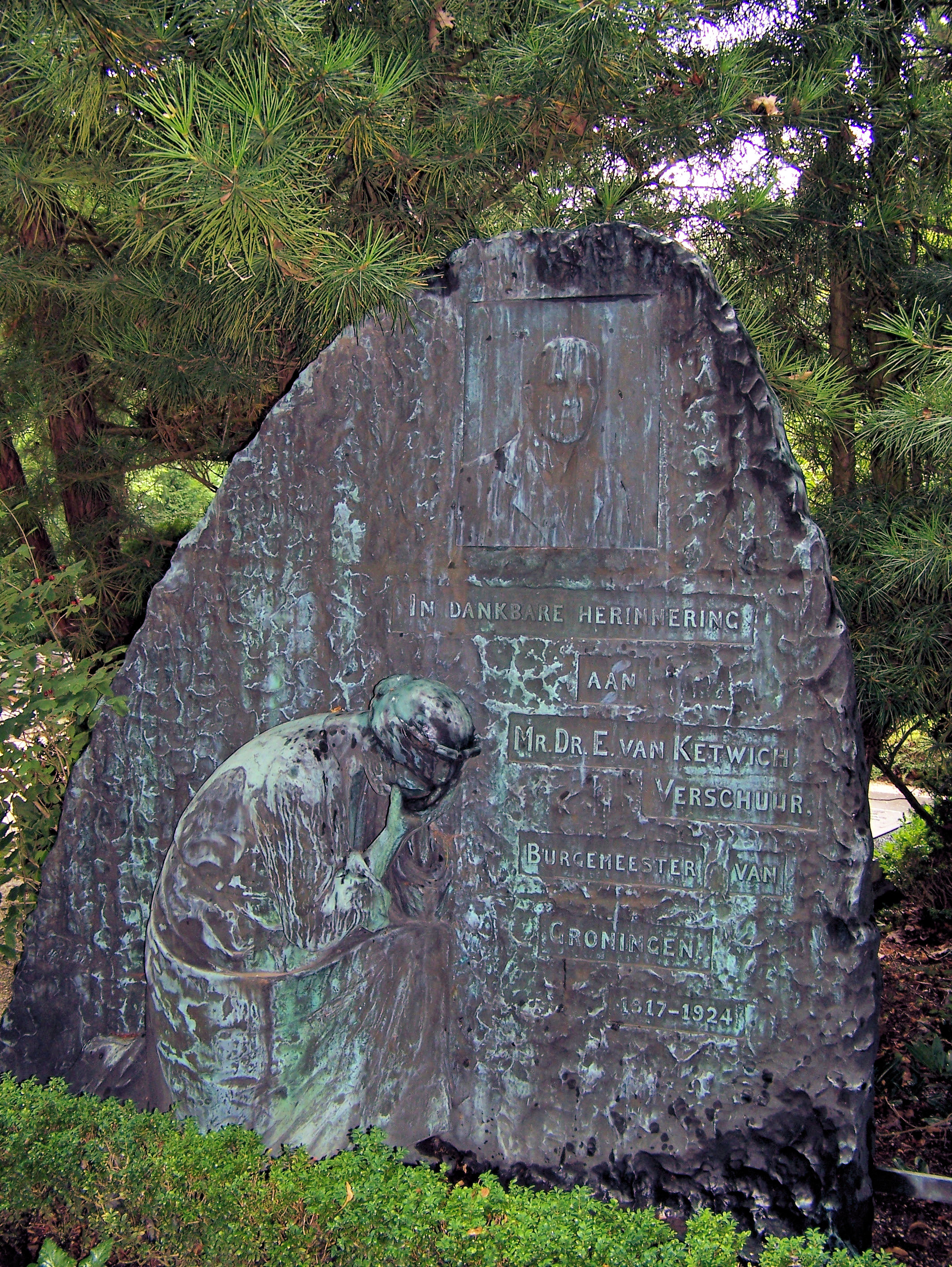 Grafmonument van Evert van Ketwich Verschuur (1879-1924), oud-burgemeester van Groningen.